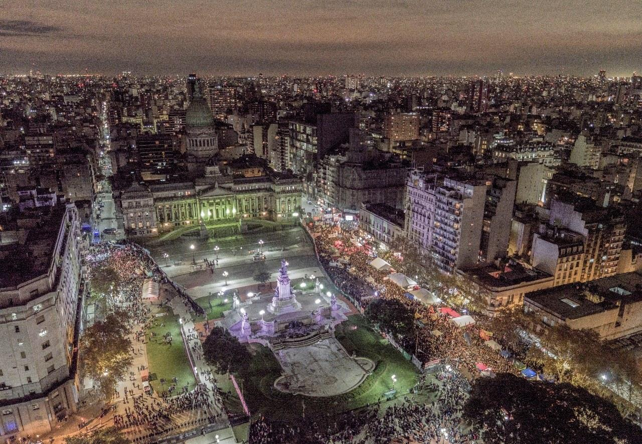 Marchas del 13 de junio de 2018 al Congreso durante la sesión de discusión para la aprobación de la ley por el aborto legal, seguro y gratuito.